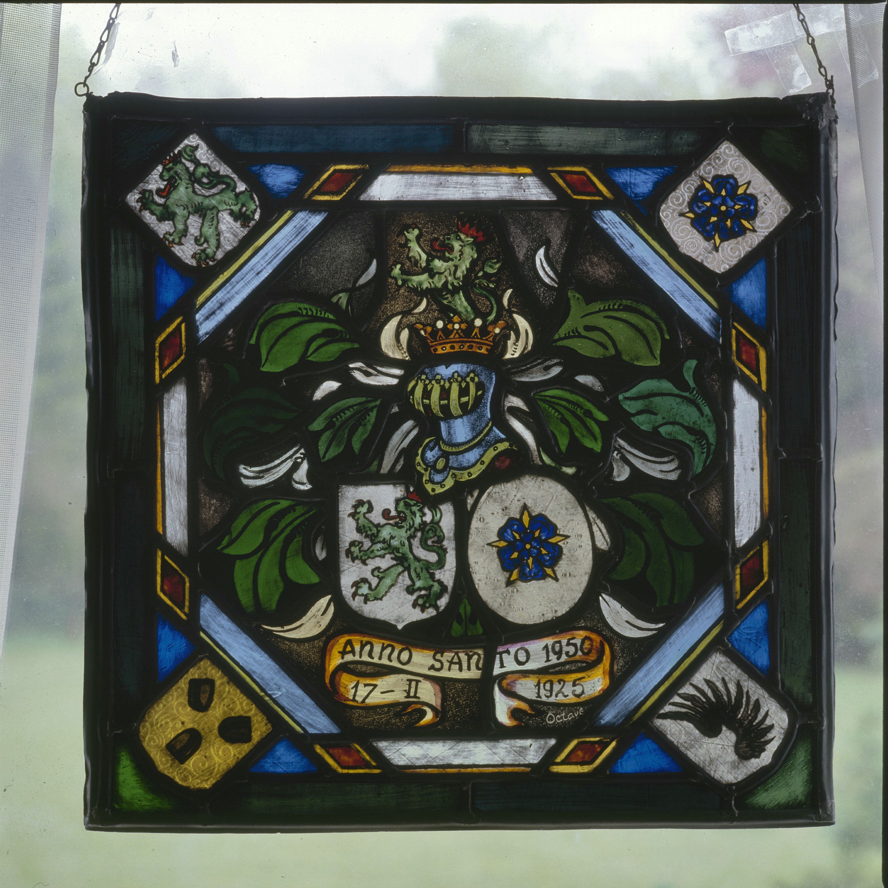 HUIS 'T SUIDERAS: Interieur, herdenkingsraam, glas-in-lood, met wapens Van Nispen-Ruys de Beerenbrouck (opmerking: Gefotografeerd voor Wonen in Arcadië, bladzijde 239)